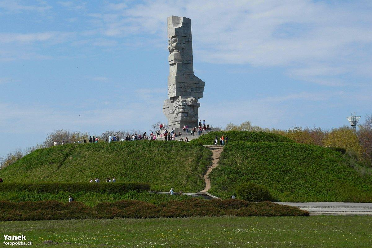 Pomnik Obrońców Wybrzeża na Westerplatte